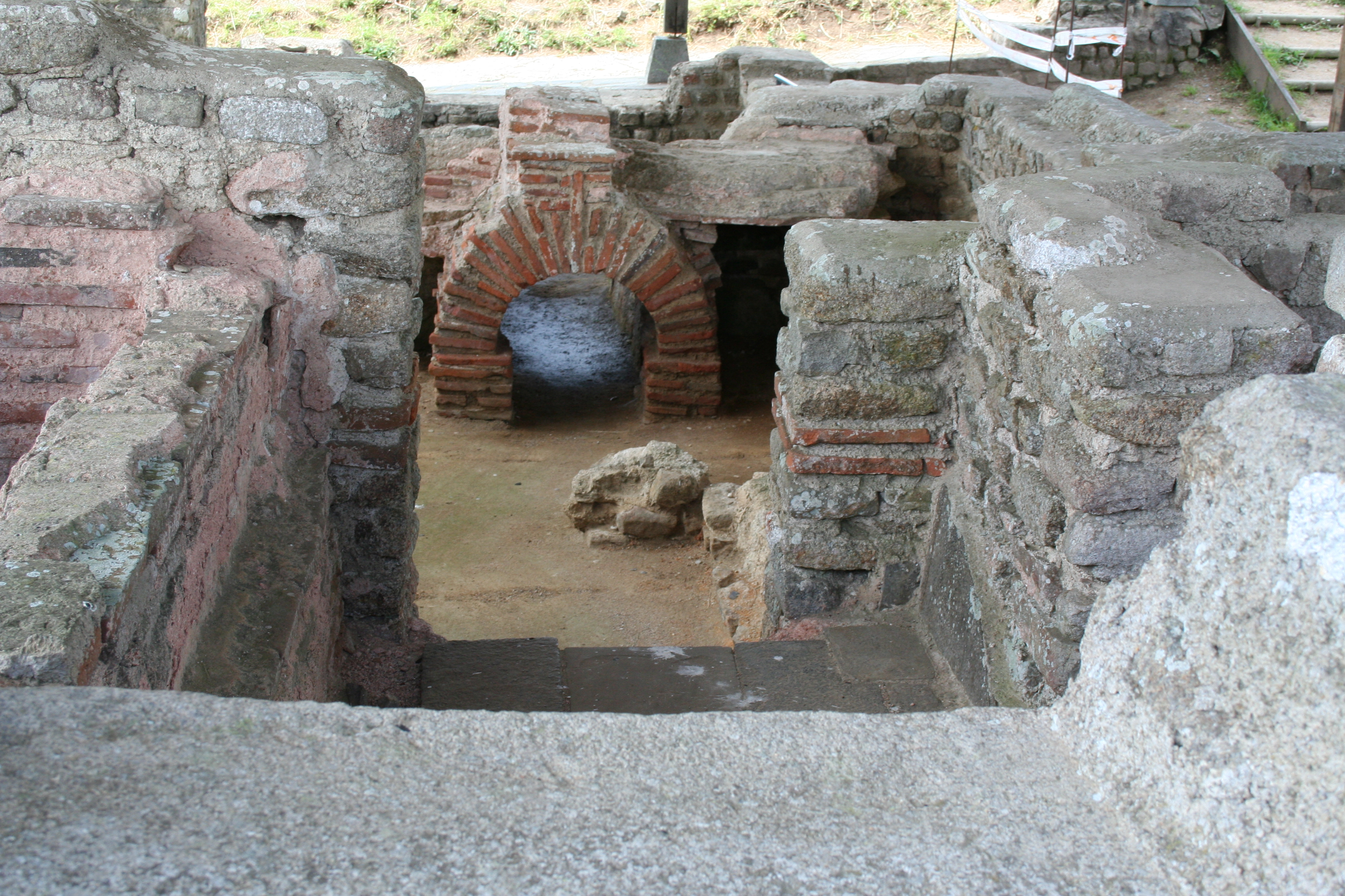 Grands thermes de la forteresse de Jublains, Mayenne